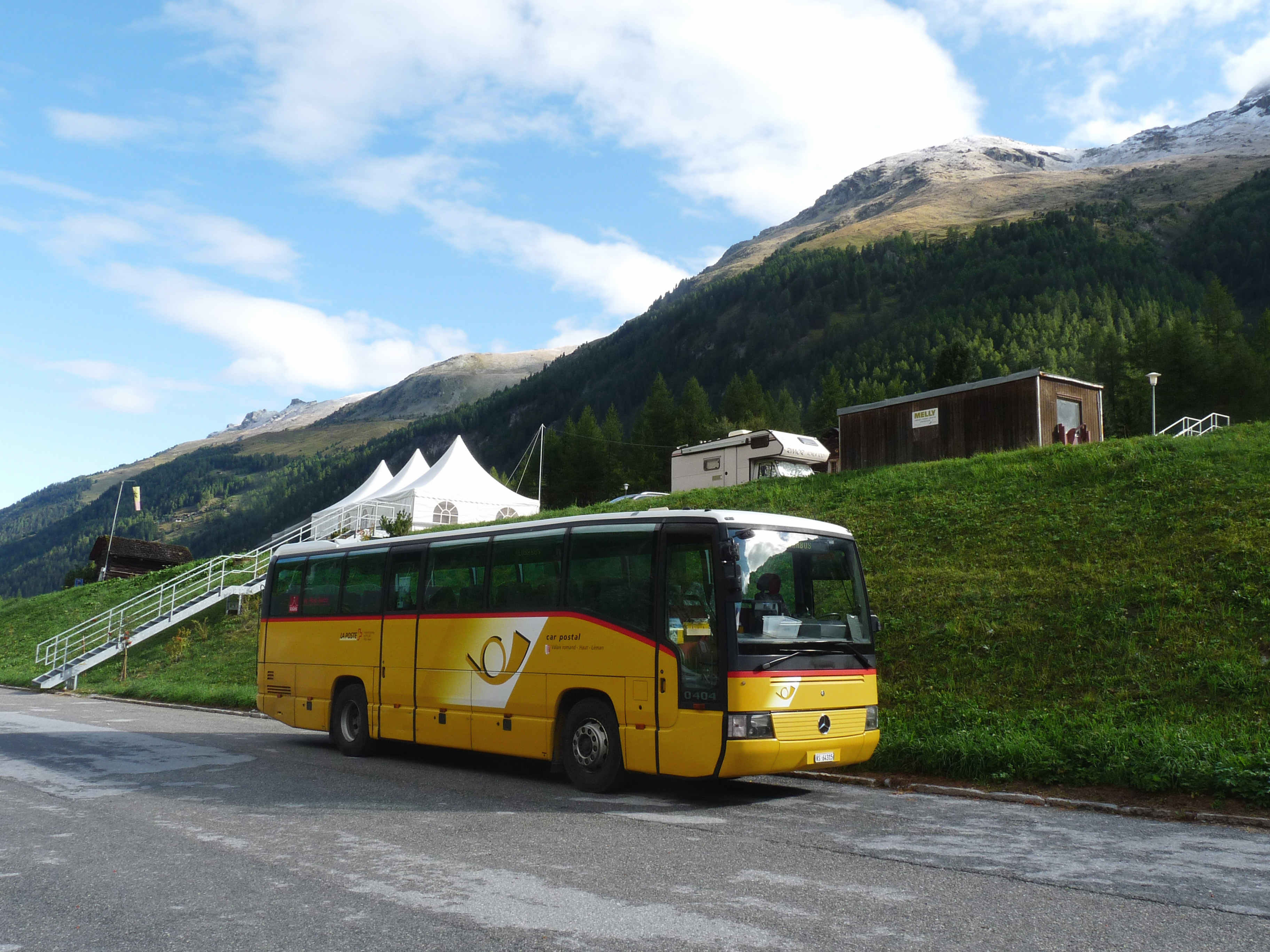 Car postal à Zinal (Valais, Suisse)